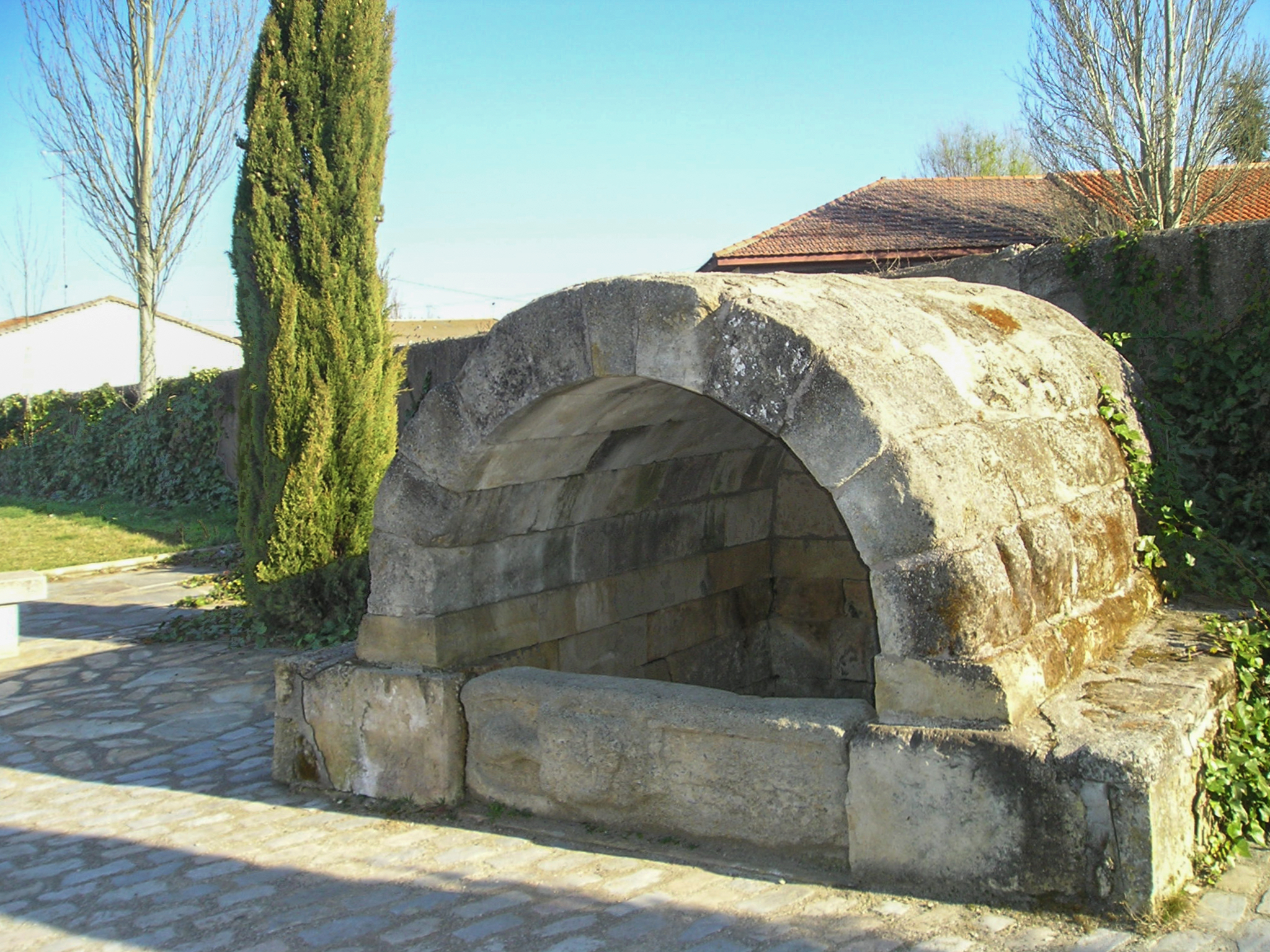 Fuente romana en calzada de Valdunciel (Salmanca, España), junto a la vía de la Plata